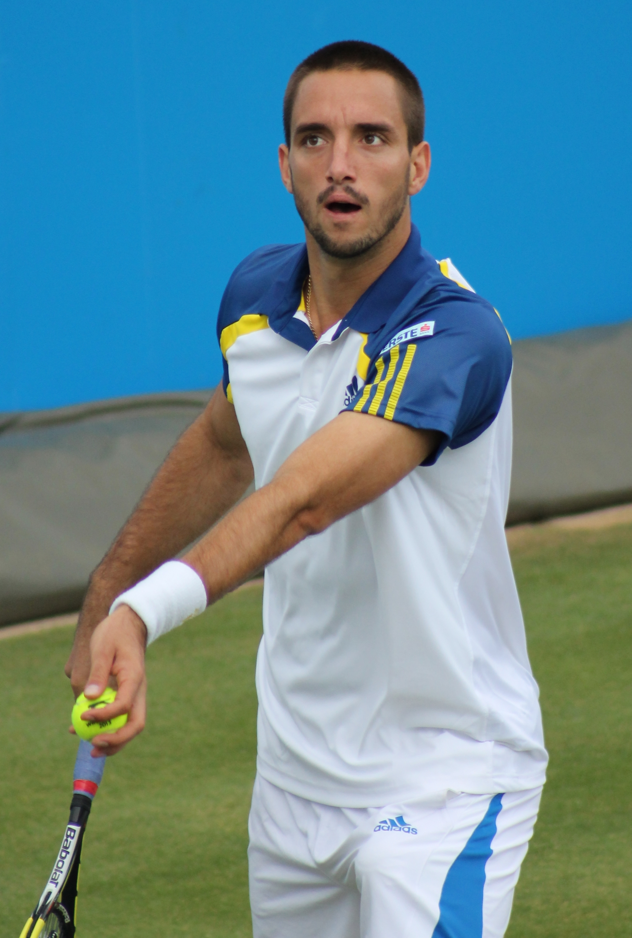 Troicki QC13-010